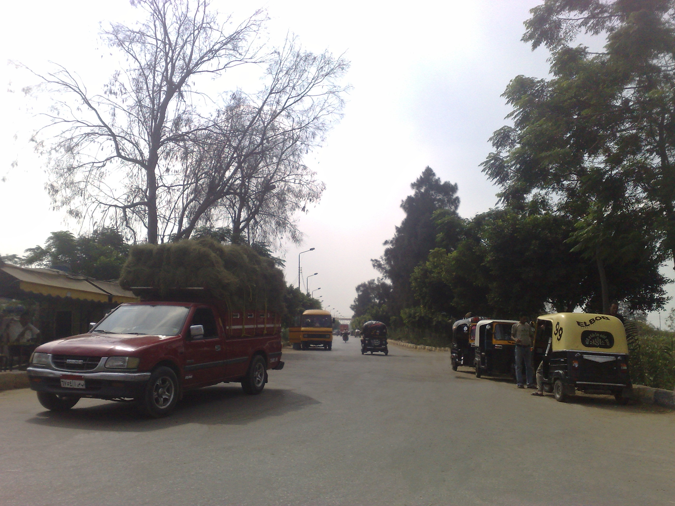 طريق دسوق - شبراخيت من الرحمانية